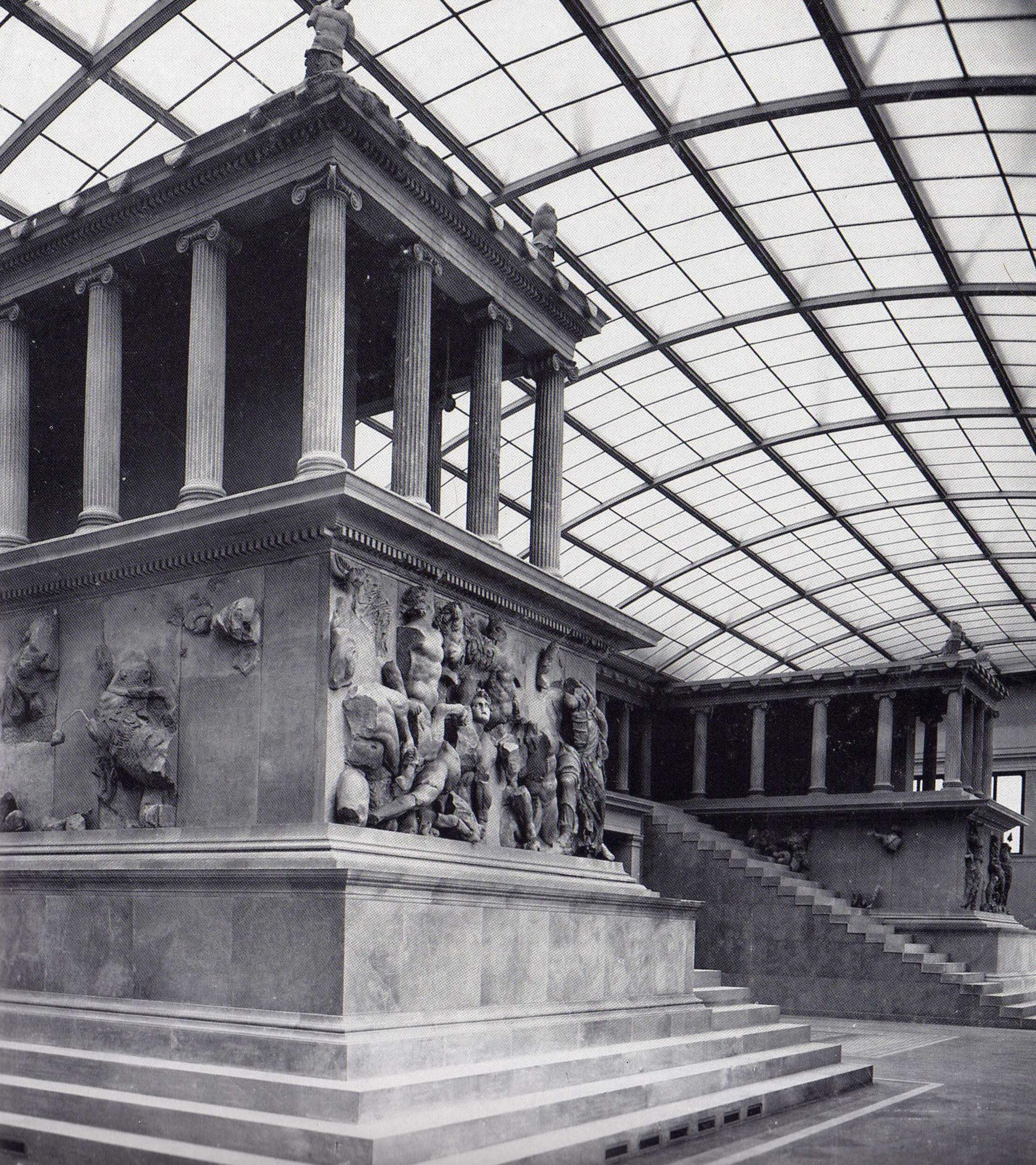 Rekonstruktion des Pergamonaltars im „Interimsbau“; Westseite, vor 1908